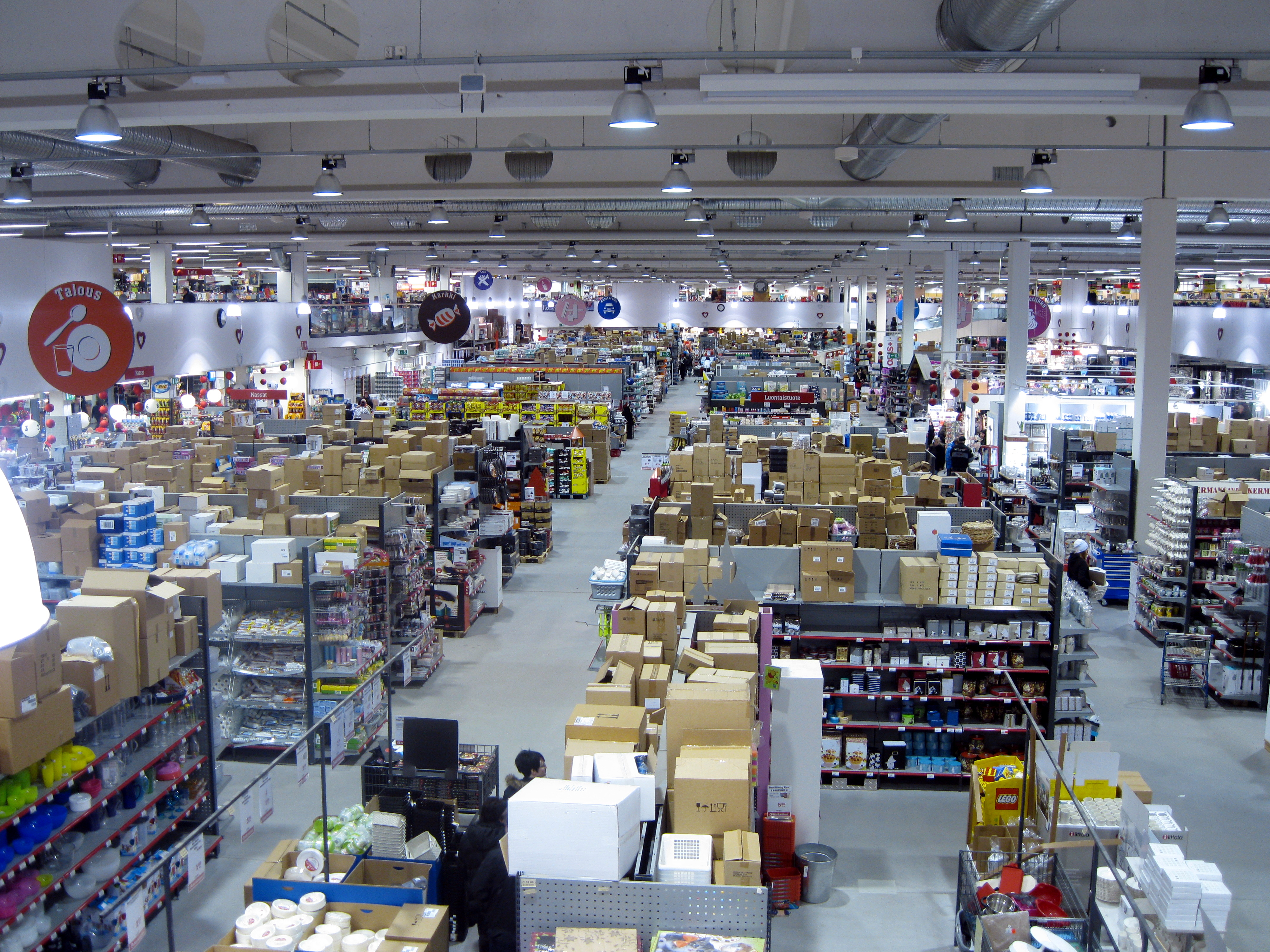 Ylivieskan J. Kärkkäinen tavaratalo kuvattuna rakennuksen toisesta kerroksesta.